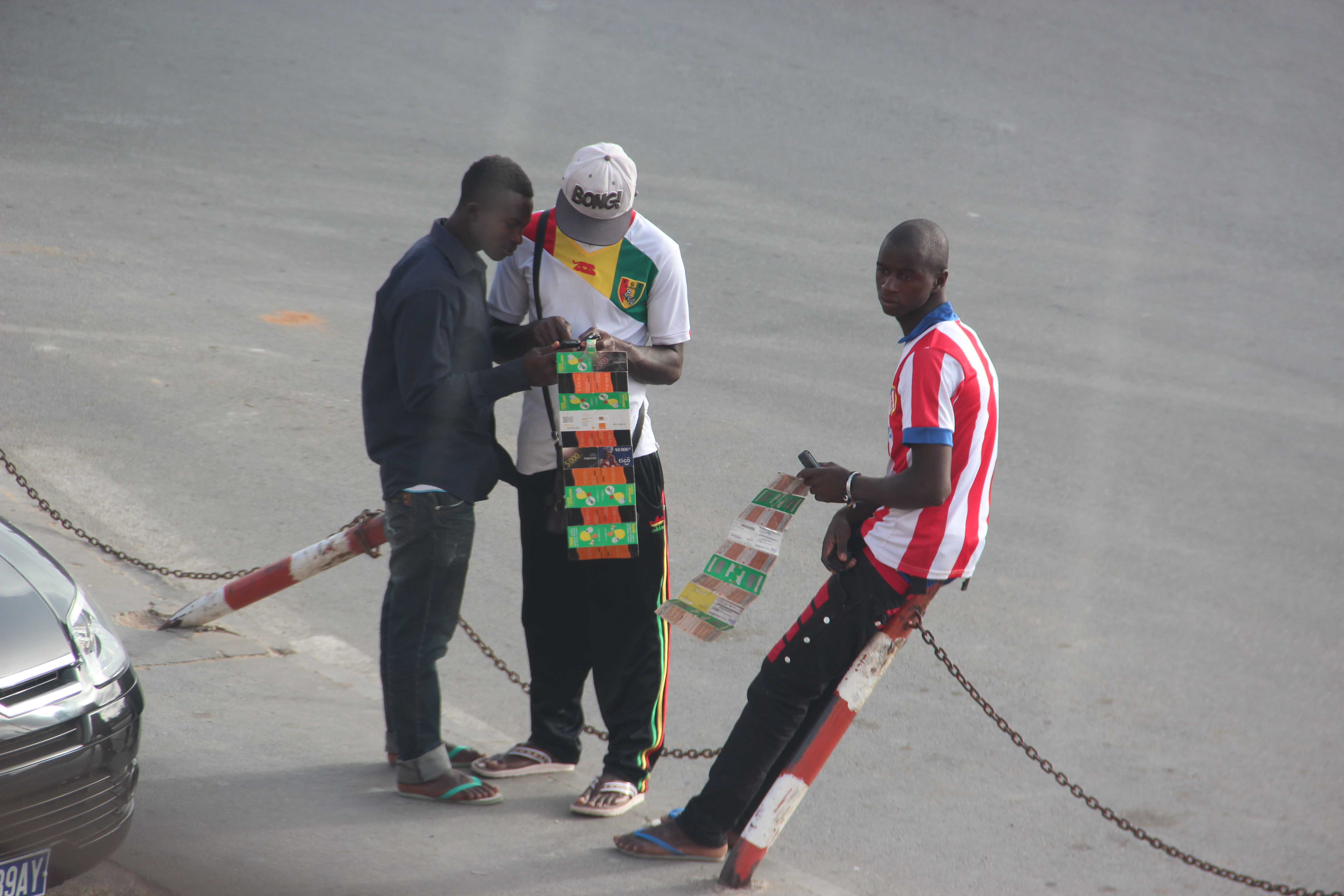 Vendeurs de recharges téléphoniques Orange à Ngor, Dakar (Sénégal).